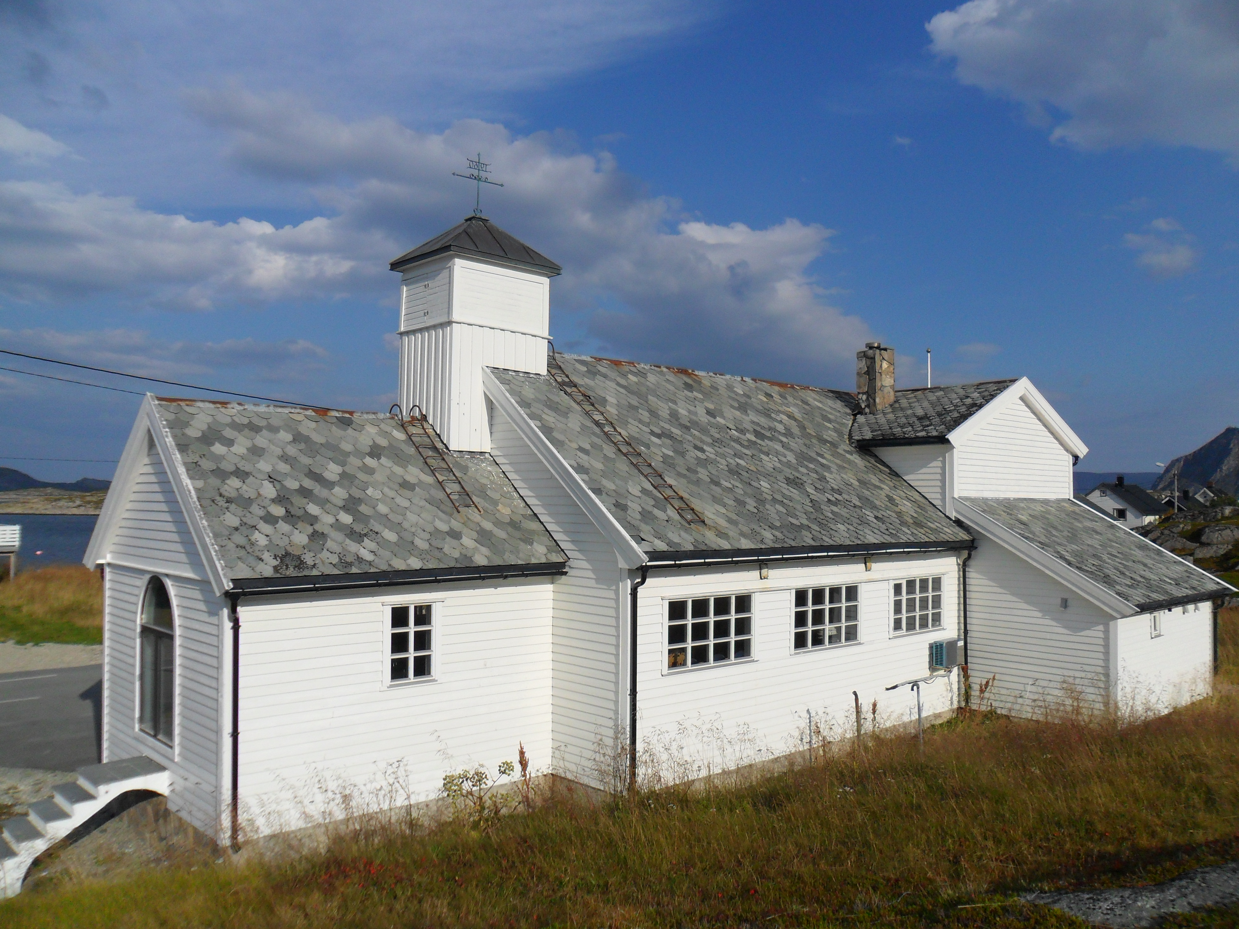 Gjesvær kirke i Nordkapp kommune